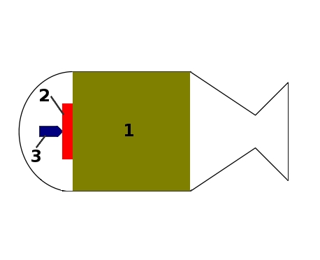 bombicka